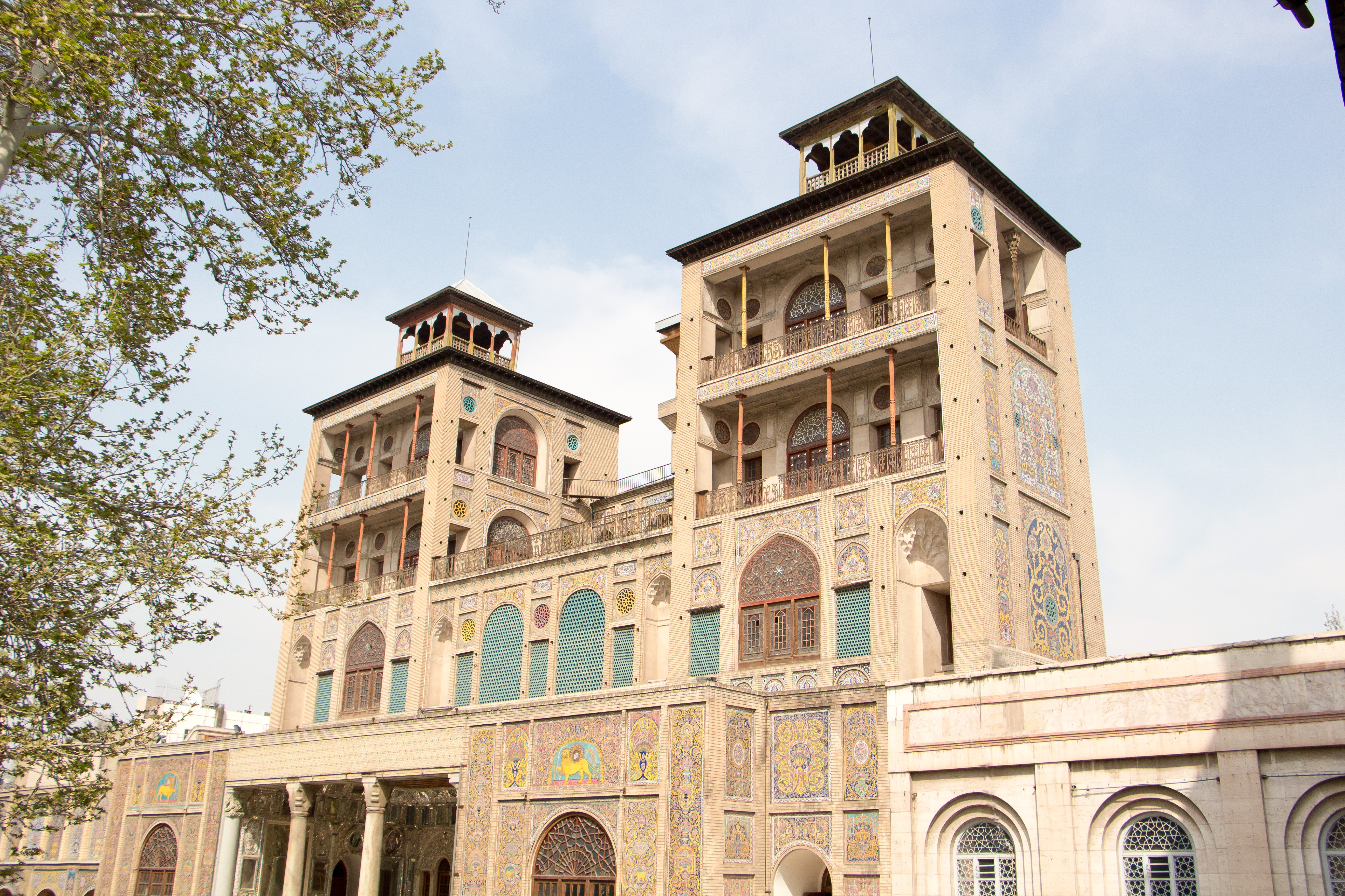 کاخ گلستان